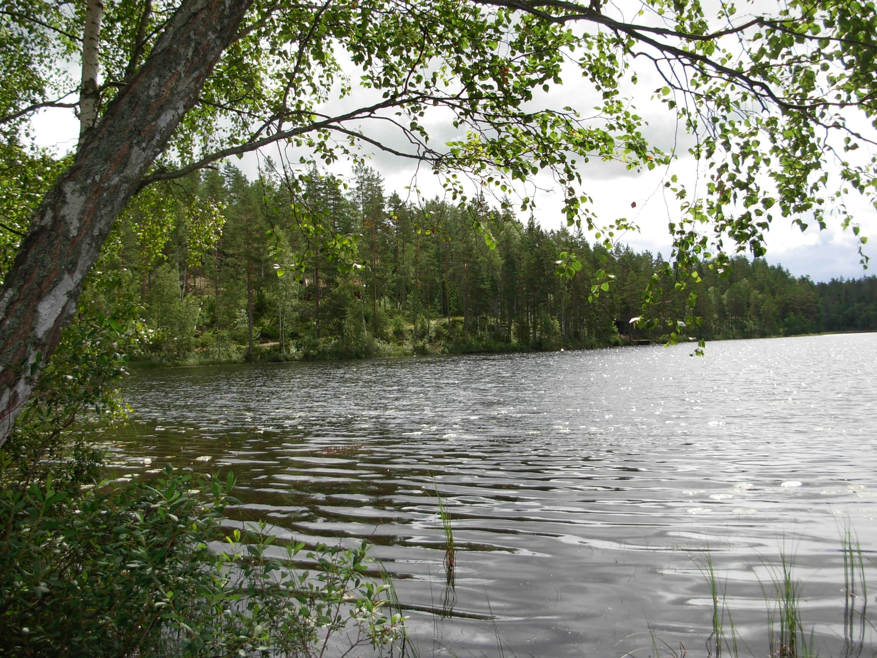 Braxnasjön är en skogssjö i Tiveden.